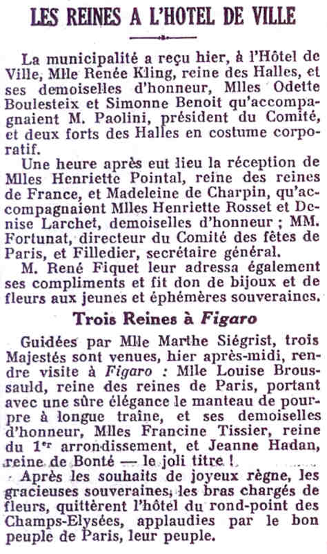 Échos des Reines de la Mi-Carême parisienne en mars 1934.